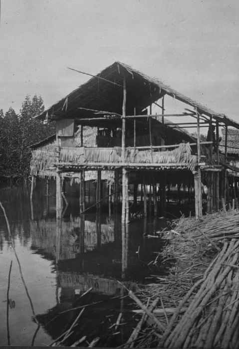 Foto. Paalwoning in Koealalangsa